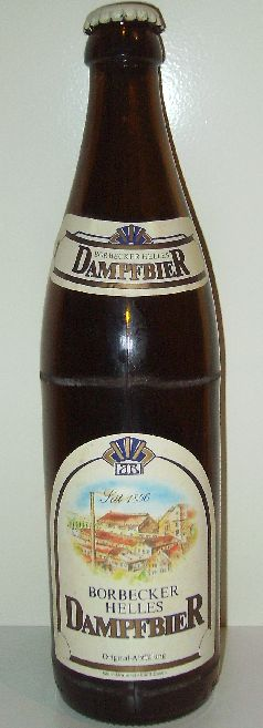 german Dampf beer